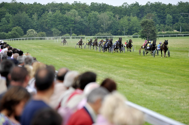 Course